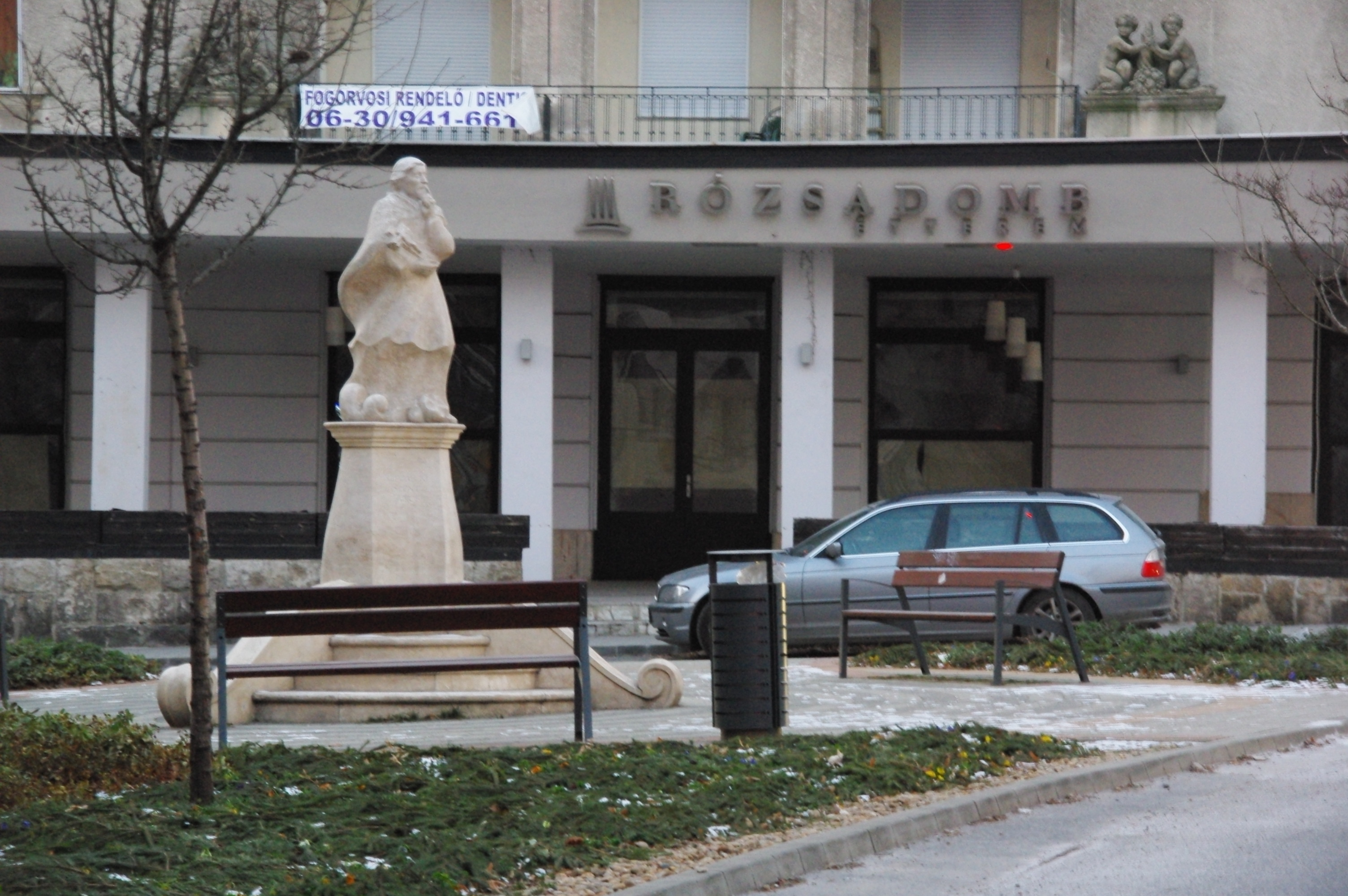 1848-ban is állt ezen a helyen egy Nepomuki Szent János-szobor. A Budavár ellen induló honvédek megálltak itt egy imára. 1893-ban A szobrot ledöntötték. A közelben élt Zipernovszky Károly − a Ganz-gyár mérnöke, a transzformátor feltalálója, tudós, országgyűlési képviselő −, aki kezdeményezte a szobor újbóli felállítását. Tamás Alajos a Margit körúti ferences plébánia híveinek segítségével pénzt gyűjtött össze, és megbízta Kozlak János kőfaragó legényt egy körülbelül 50 cm nagyságú Szent János-szobor elkészítésével. A szobor egy másfél méteres talapzaton állt 1921-ig. Ennek a kis szobornak a rongálódását főképp az idézte elő, hogy közkút volt előtte, annak négy sarkán lombos fák − ott pihentették és itatták lovaikat a fuvarosok. A szobor az idők folyamán annyira megrongálódott, hogy a főváros hatósága felszólította az akkori plébánost, hogy gondoskodjék a helyreállításáról. Az egyházközösség Tóth István szobrászt kérte fel, hogy Zentán álló Nepomuki-szobrának mását készítse el. Szakáll Lukács építőmester ingyen vállalta a talapzat elkészítését, a főváros adta a talapzat kövét, a Ganz-gyár adománya volt a vasrács, a budapesti gázgyár pedig ingyen vállalta a szobor négy sarkán elhelyezett díszes gázlámpák elkészítését. A szobrot pontosan 90 éve, 1921 szeptemberében adták át, leleplezésekor beszédet mondott Vass József vallás- és közoktatásügyi miniszter. A szobor három évtizedig sem állt szépen kialakított környezetében, az 1940-es évek végén leszerelték, a kis tér sokáig üres volt. Forrás: masodikkerulet.hu Markolt Sebestyén szobrászművész e helyre készült mészkő szobrát 2011-ben állították fel a kis téren.